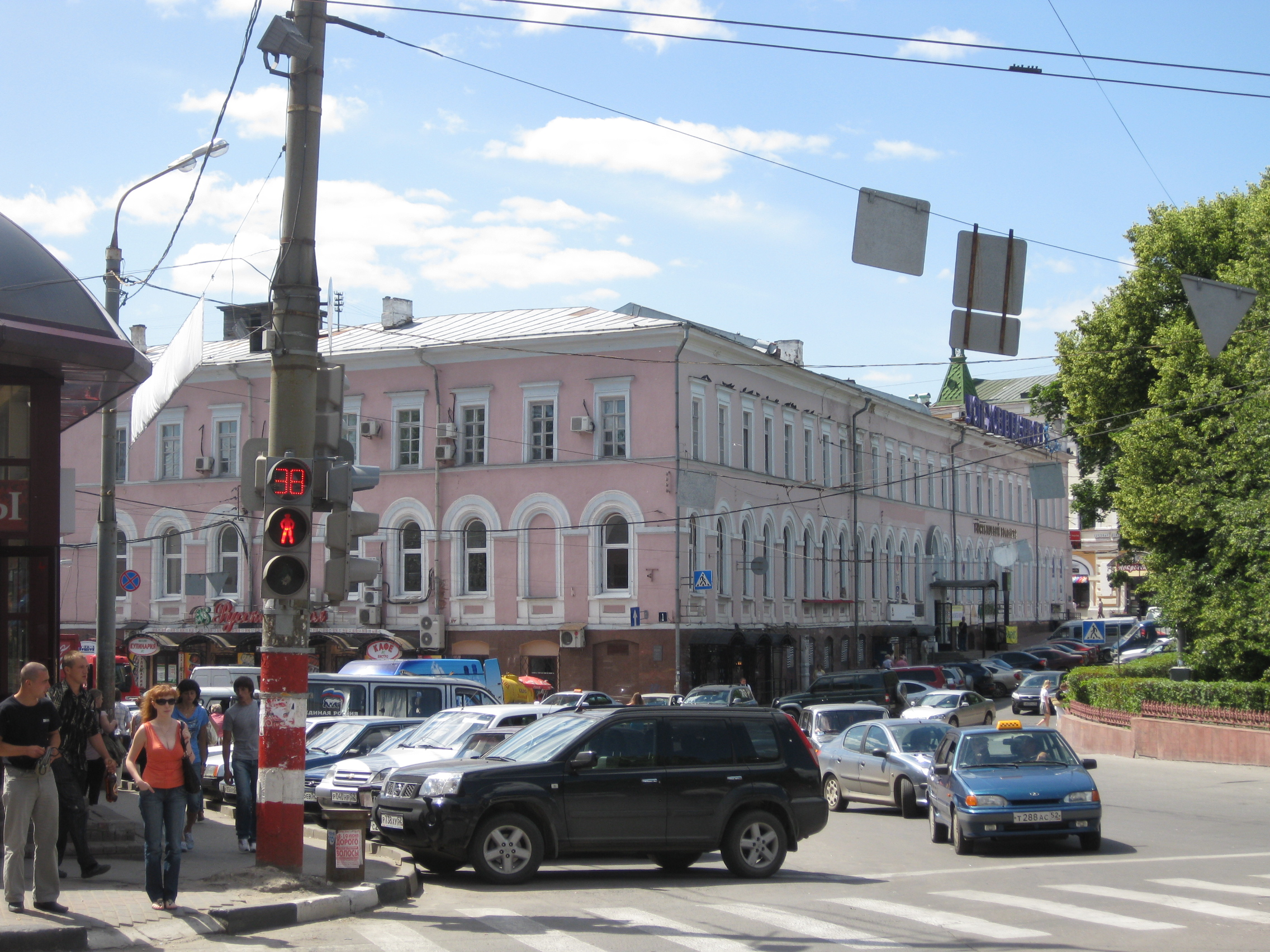 Выставочный зал на площади Минина в Нижнем Новгороде